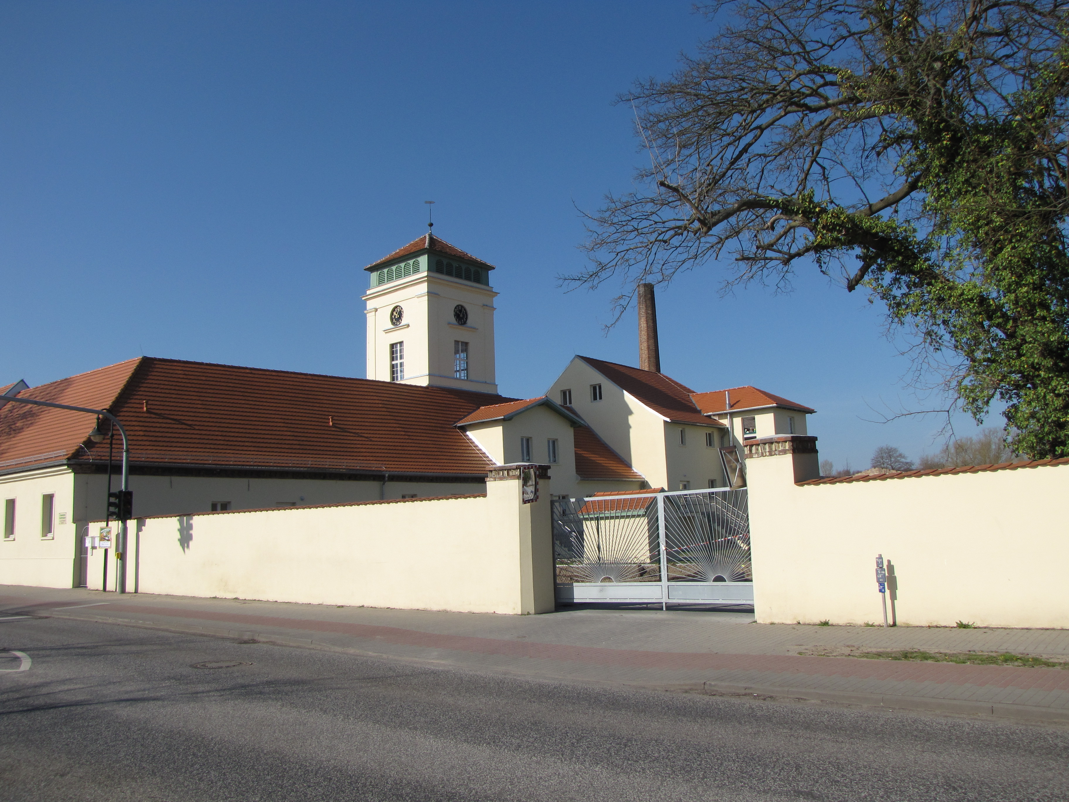 Groß Machnow, Gem. Rangsdorf, Brandenburg, Gutsanlage von Norden, mit Uhrenturm